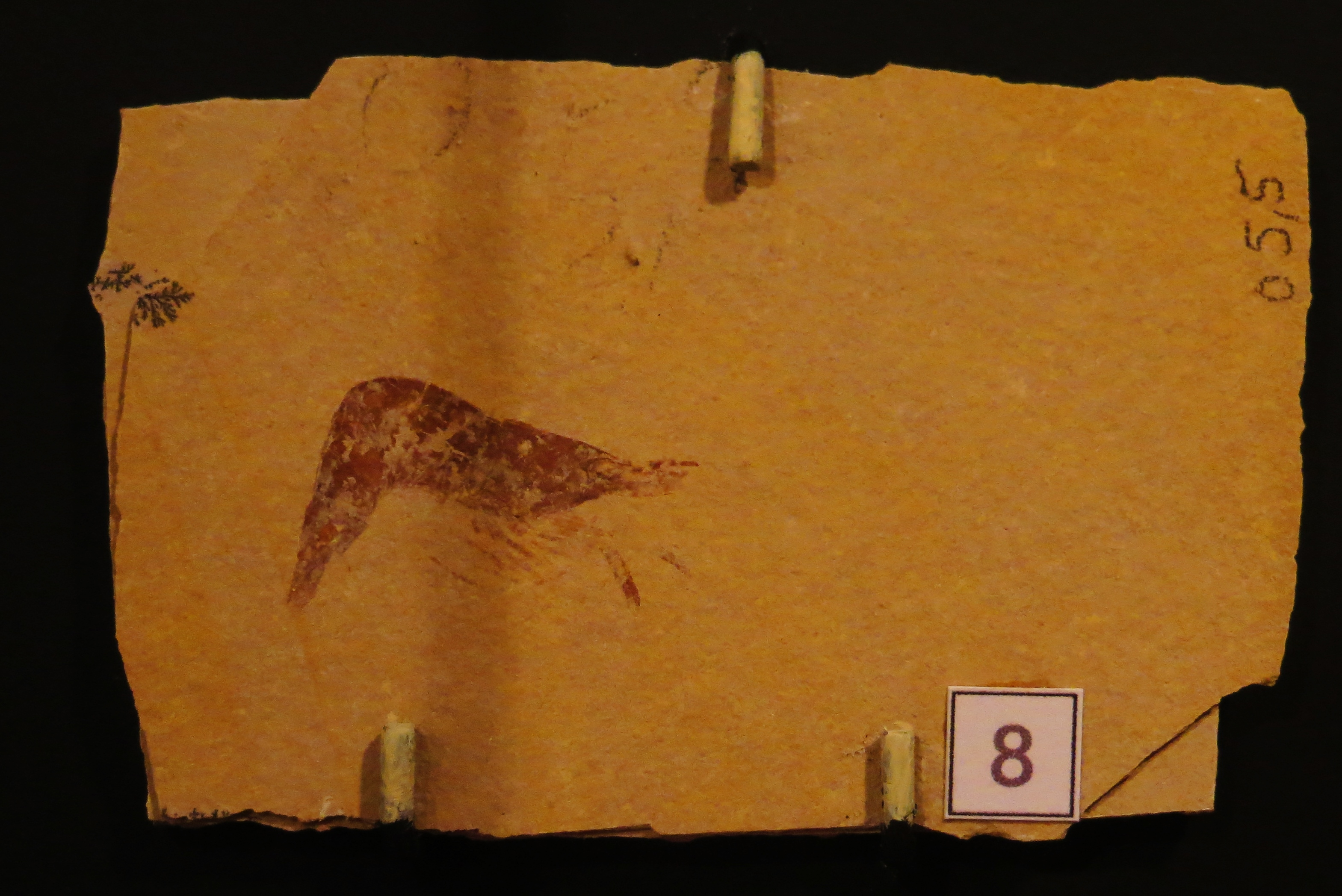 Took the picture at Natural History Museum in Bamberg